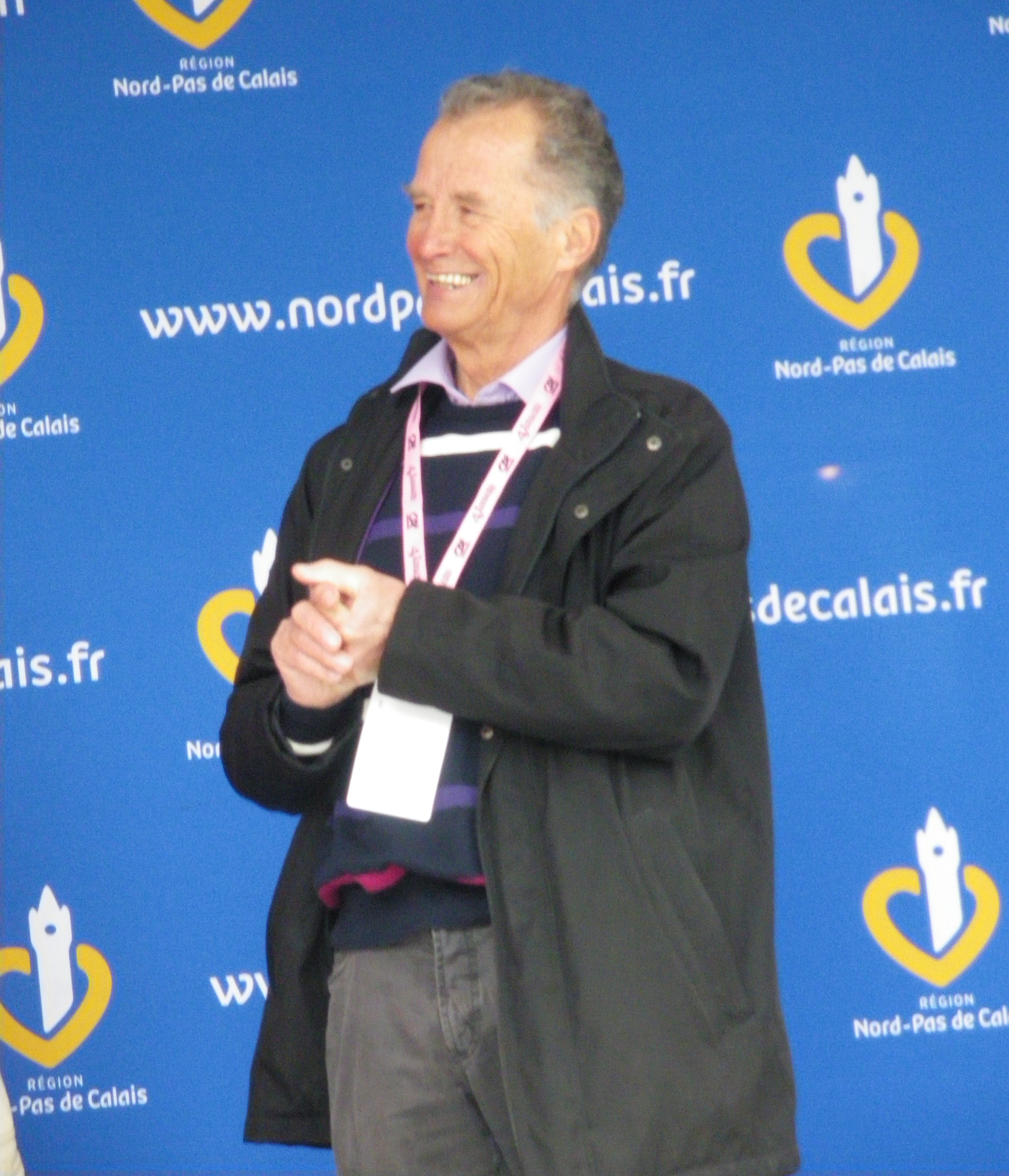 Henri Duez, coureur cycliste français professionnel de 1961 à 1966, lors de la présentation de la dernière étape des Quatre jours de Dunkerque 2012.